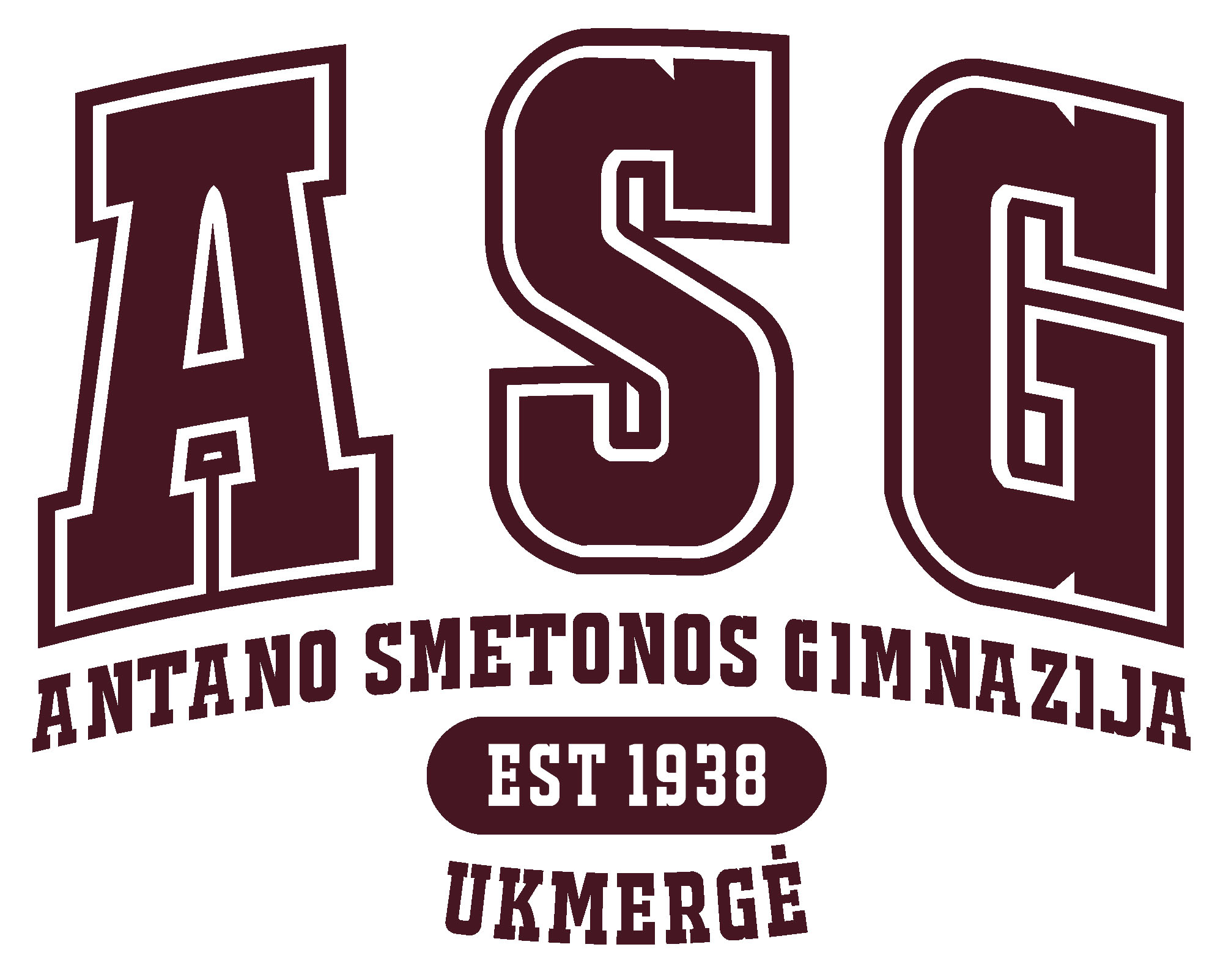 Neoficialusis Ukmergės Antano Smetonos gimnazijos logotipas-emblema